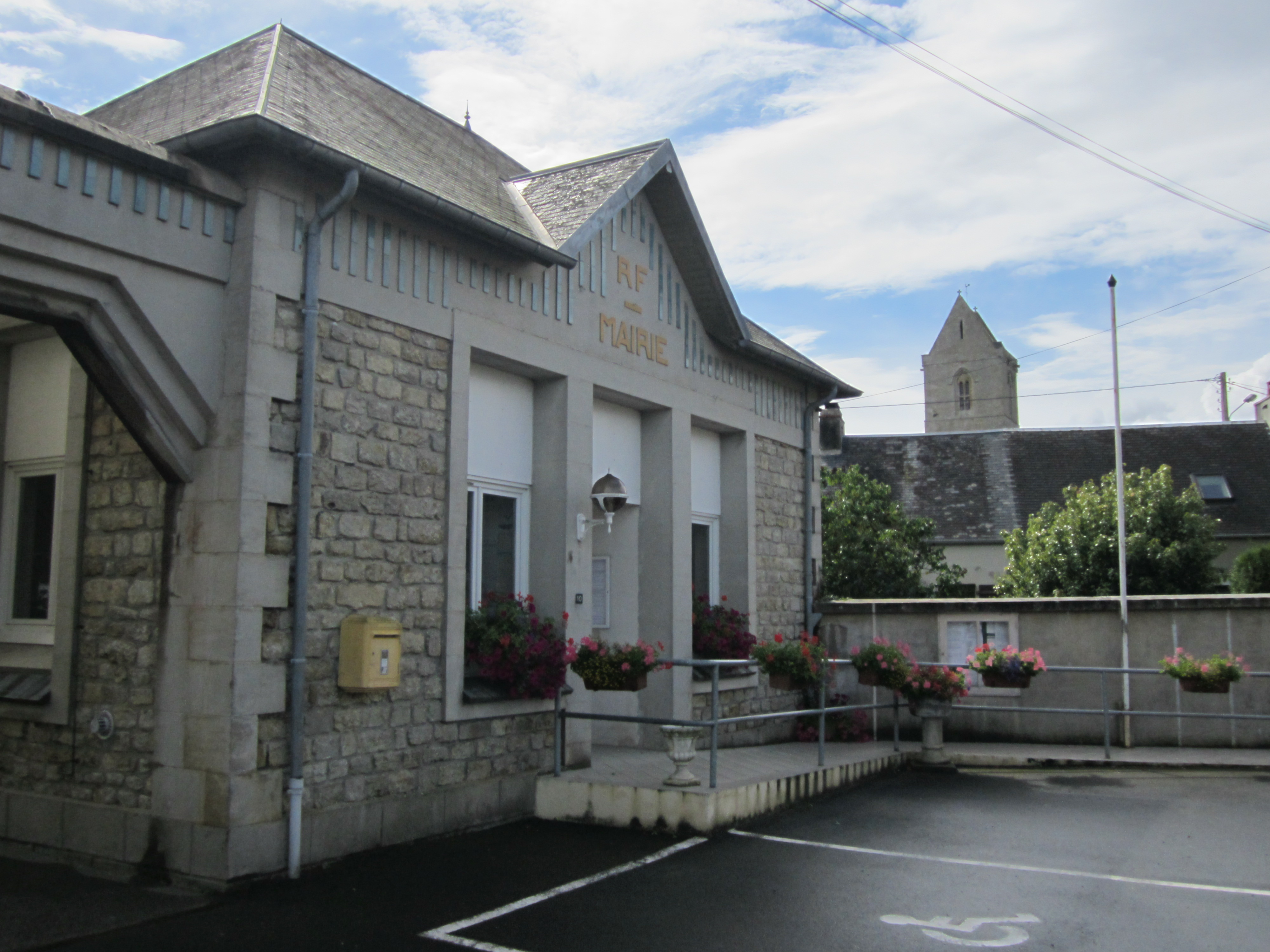 Vindefontaine